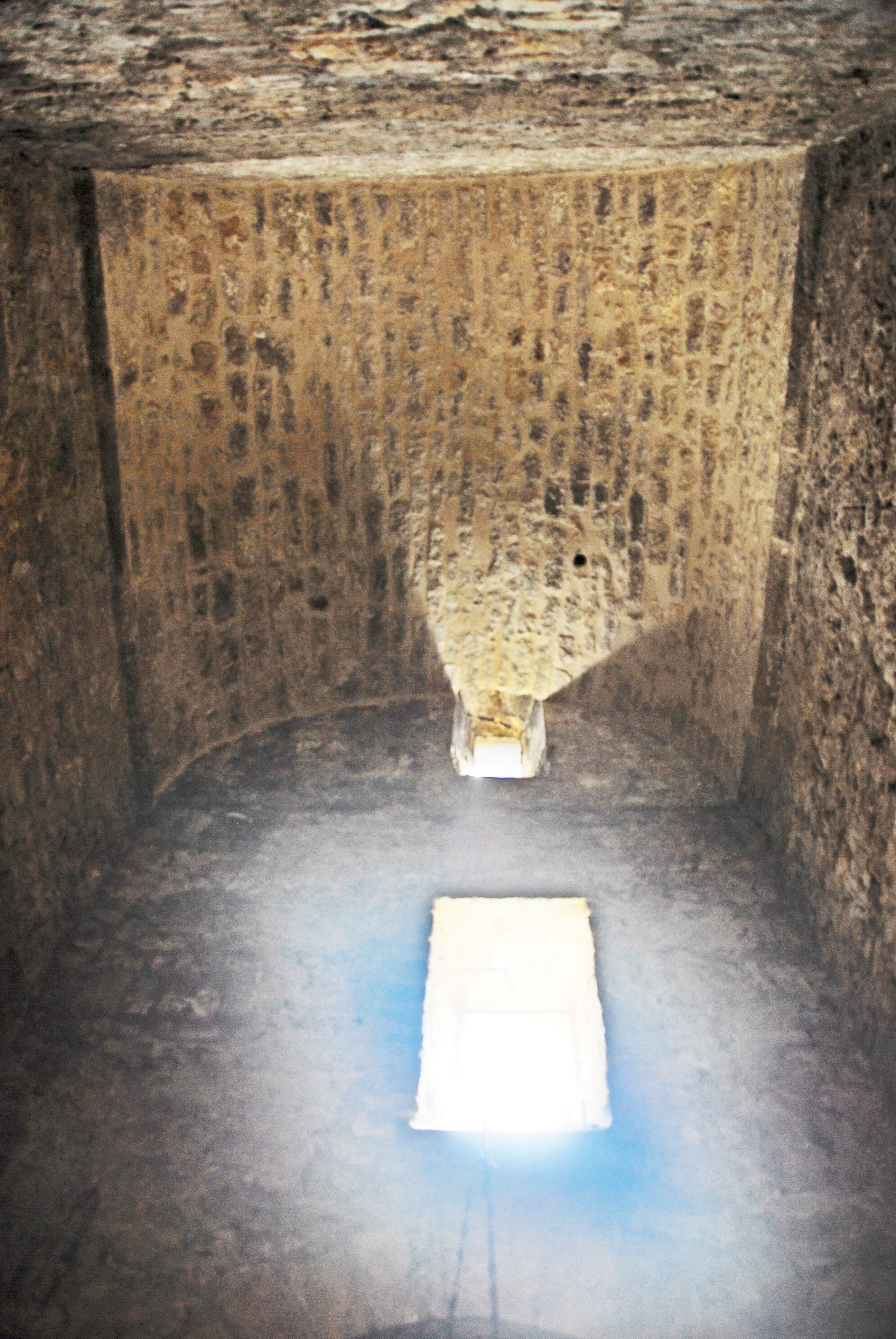 Kathedrale von Vence, Seitenschiffgewölbe